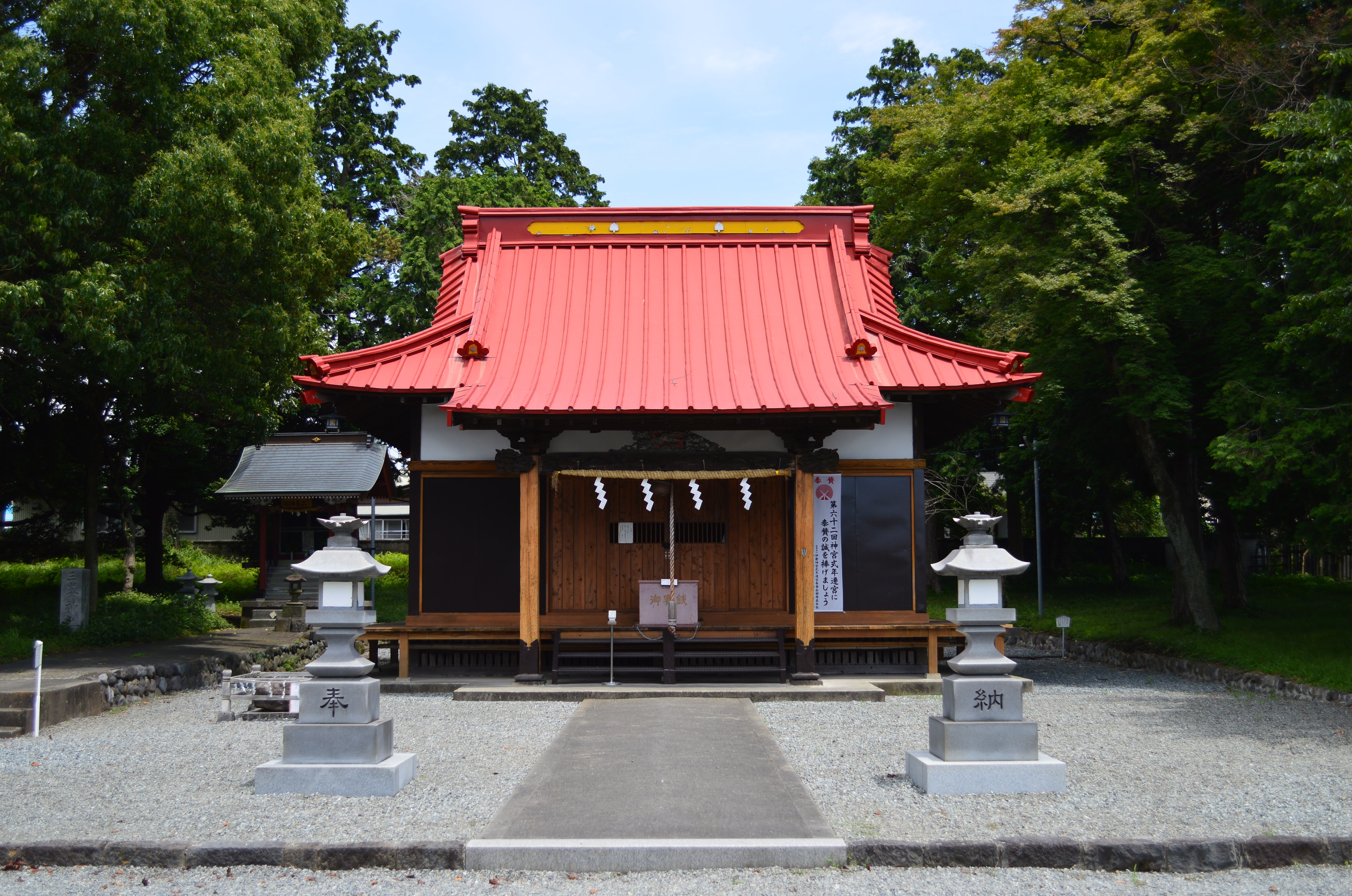 富知神社 拝殿-1